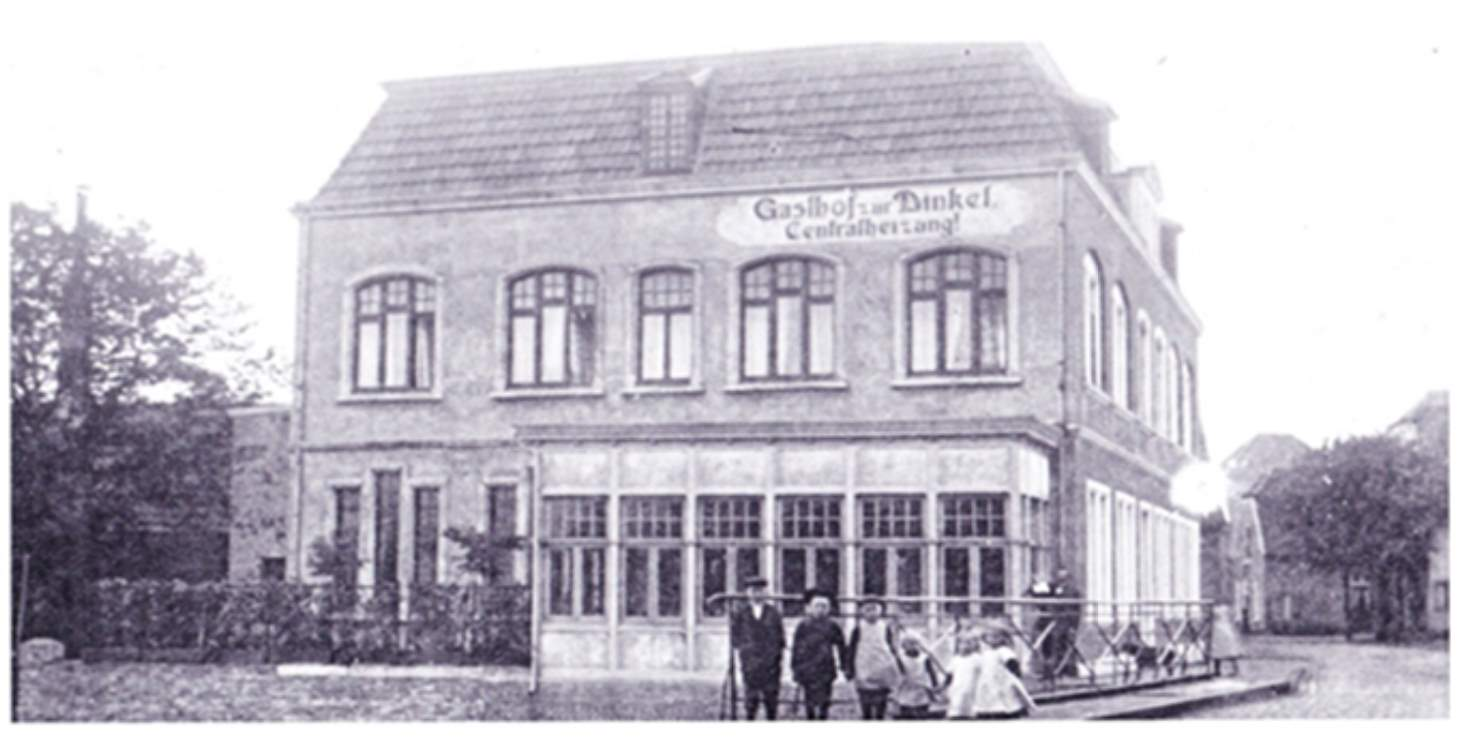 Hotel Richter Epe (Westf.) um 1900